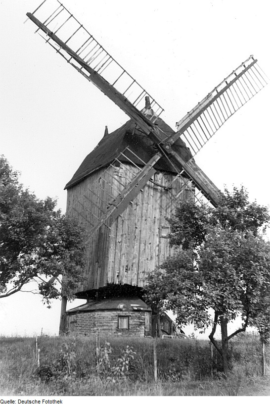 Original image description from the Deutsche Fotothek Huy-Anderbeck. Bockmühle, Baujahr 1864